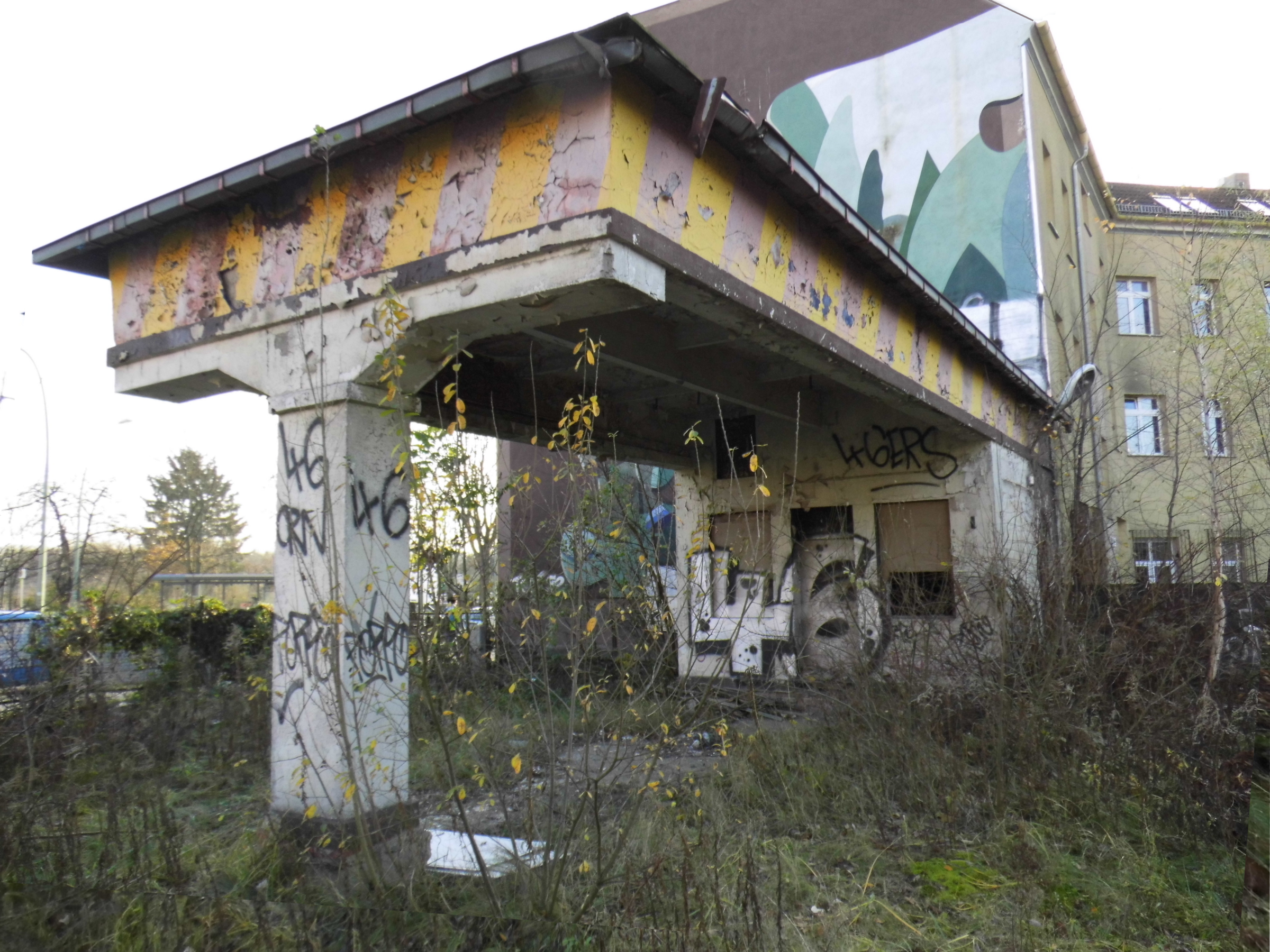 Ehemalige Tankstelle 1938 gebaut von der Deutsch-Amerikanischen Petroleum Gesellschaft, bis 1945 betrieben als Standard-Oil-Tankstelle, von 1950 bis 1990 als VEB Minol-Tankstelle. Das Foto zeigt den Zustand im November 2017.